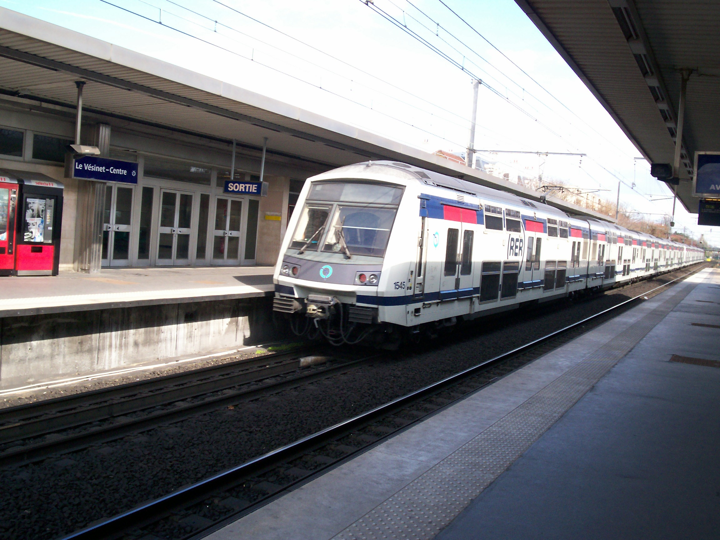 MI 2N - Gare du Vésinet-Centre